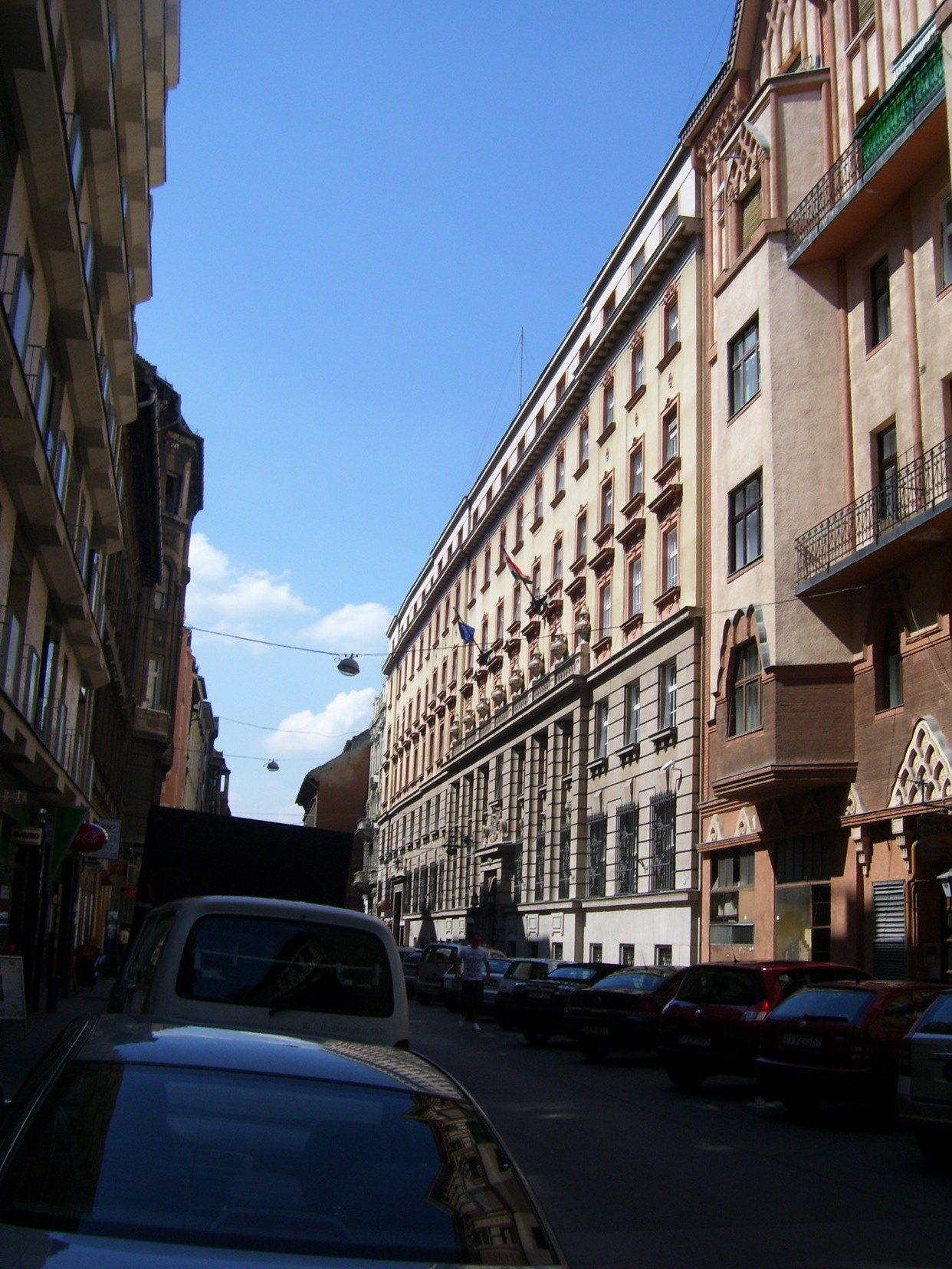 Budapest, VII. Akácfa utca 15-21 BKV székház. Épült Wälder Gyula tervei alapján 1925-26-ban